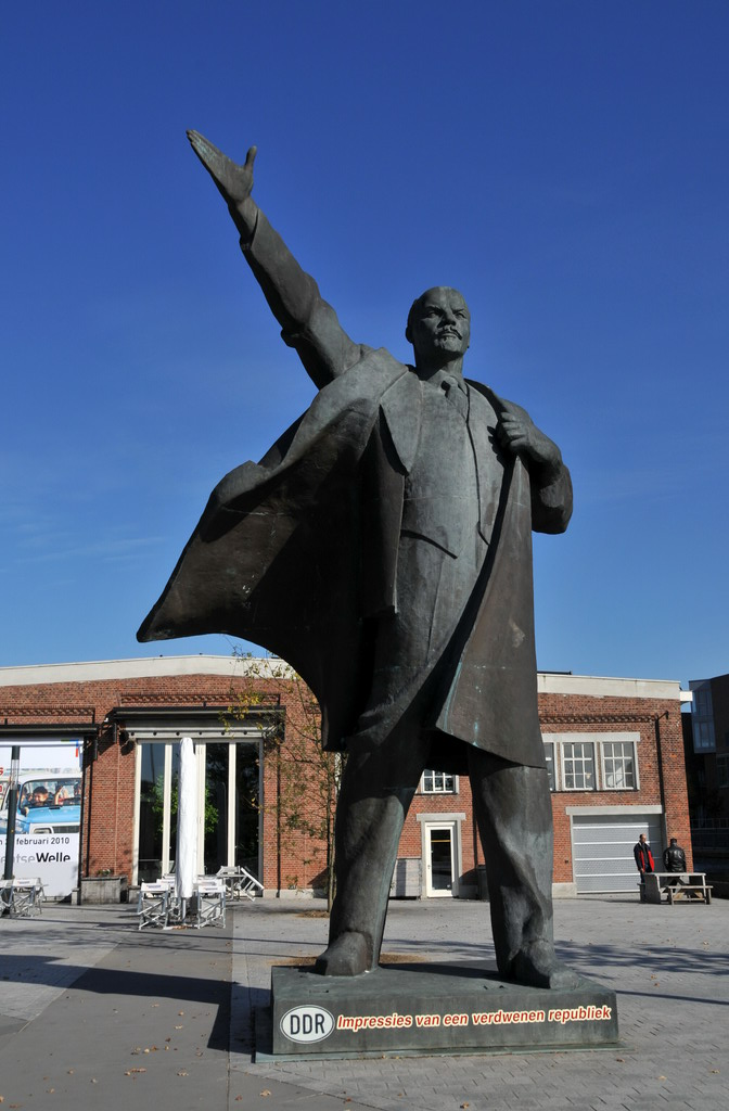 Standbeeld van Lenin, Tjuchem (gem. Slochteren, Groningen), hier in EnschedeText original Flickr-uploader: "'DDR, impressies van een verdwenen Republiek' Dit 9 meter hoge standbeeld van Vladimir Iljitsj Lenin (1870-1924) is in 1997 door de Nederlandse ondernemer Henk Koop geïmporteerd uit het Oost-Duitse Merseburg en staat sindsdien op het erf van zijn bedrijf in Tjuchem. Tot maart 2010 is het uitgeleend aan het museum TwentseWelle."